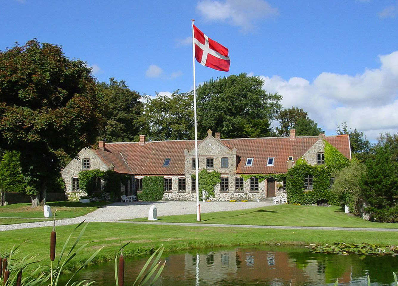 Lille Restrup er en hovedgård ved Aalestrup i Vesthimmerlands Kommune